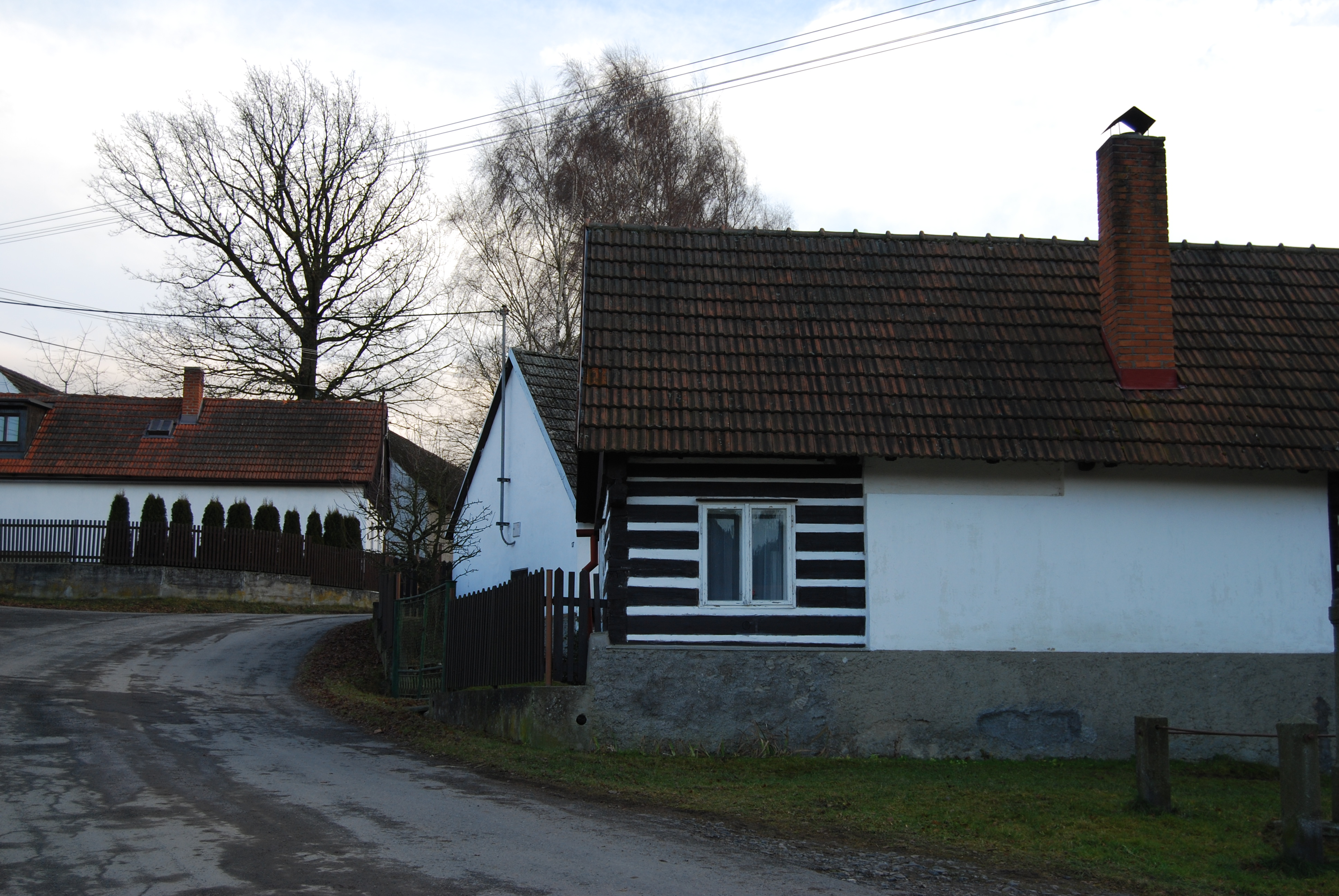 Klisinec (Hrazany). Okres Písek. Česká republika.